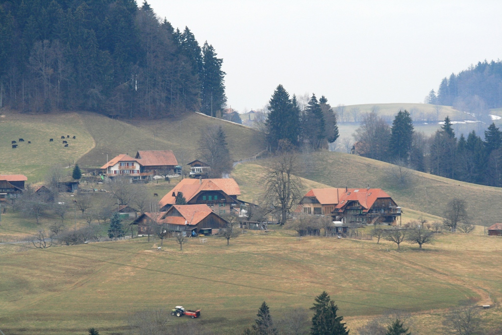 Rüschegg, Kanton Bern, Schweiz